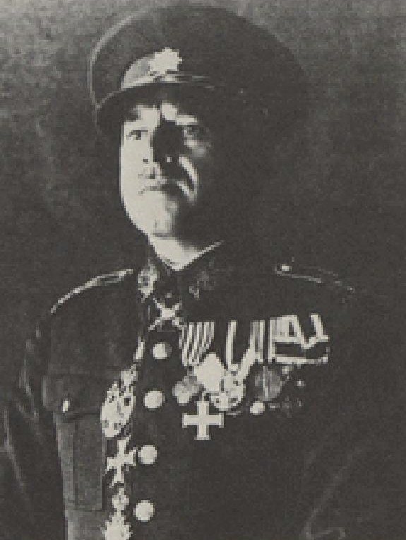 Mézl, Ondřej, 1887-1968, československý legionář, voják